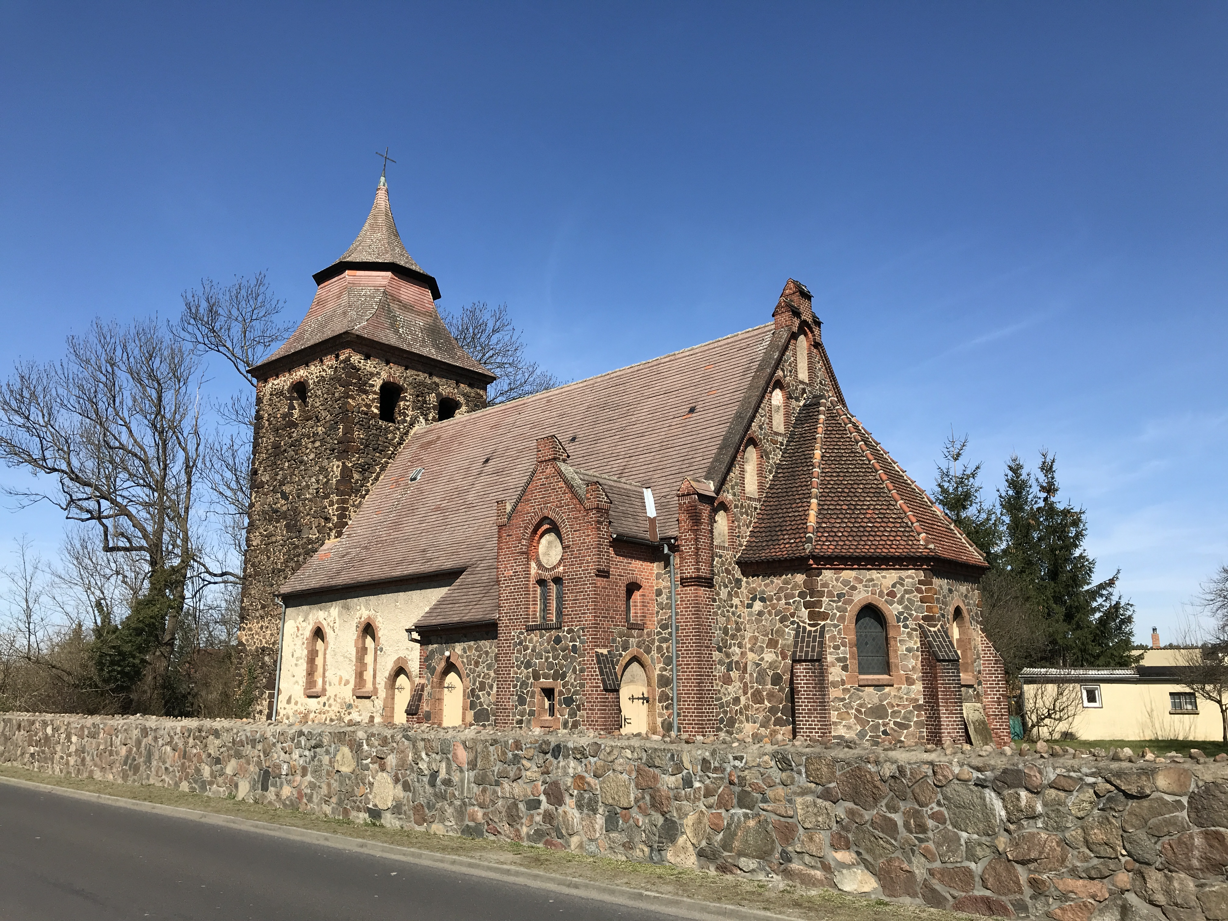 Die Dorfkirche in Calau-Buckow ist eine Feldsteinkirche aus dem 14. Jahrhundert. Von 1898 bis 1904 wurde sie erheblich umgebaut. Dabei erhielt sie eine einheitliche neugotische Kirchenausstattung.